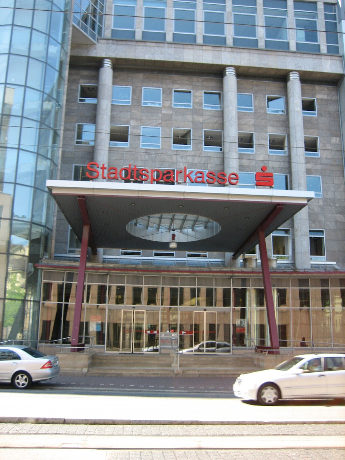 Haupteingang in die Stadtsparkasse Augsburg, Halderstraße